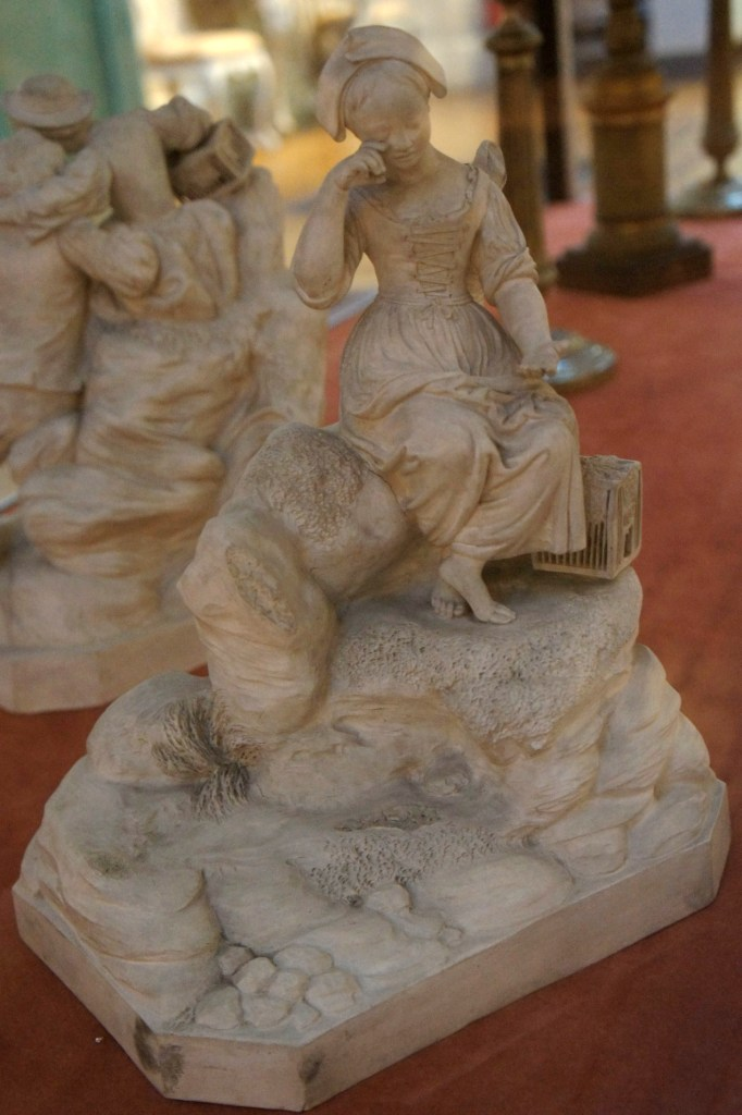 Sculpture réalisée par Cyfflé.